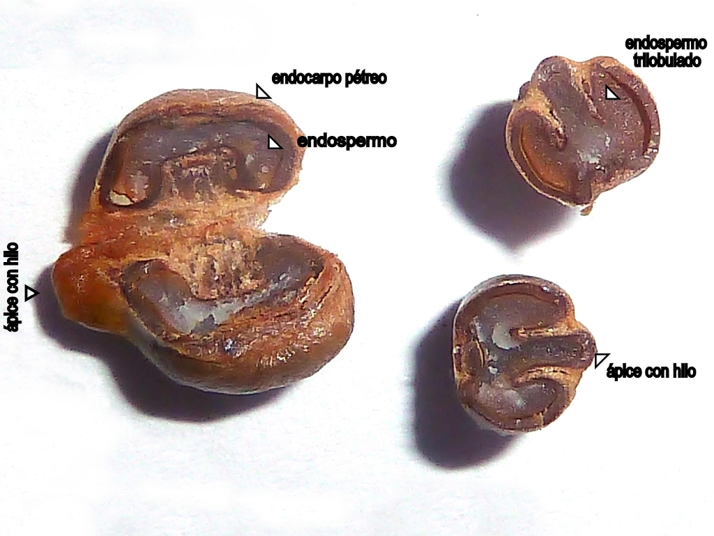 Vitis vinifera vinifera cv. "Red Globe" (Vid, Uva, Parra) : anatomía interna de una semilla en cortes axial y longitudinal - Comercio, Madrid (España).